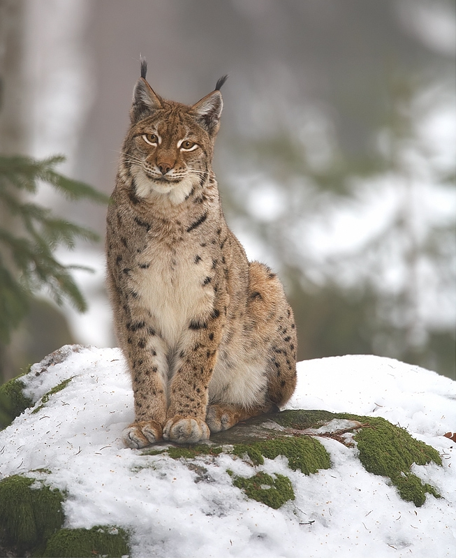 Lynx lynx, Nationalpark Bayerischer Wald, Deutschland